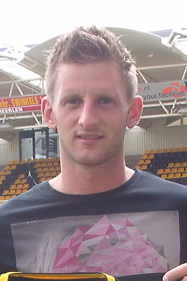 Jens van Son